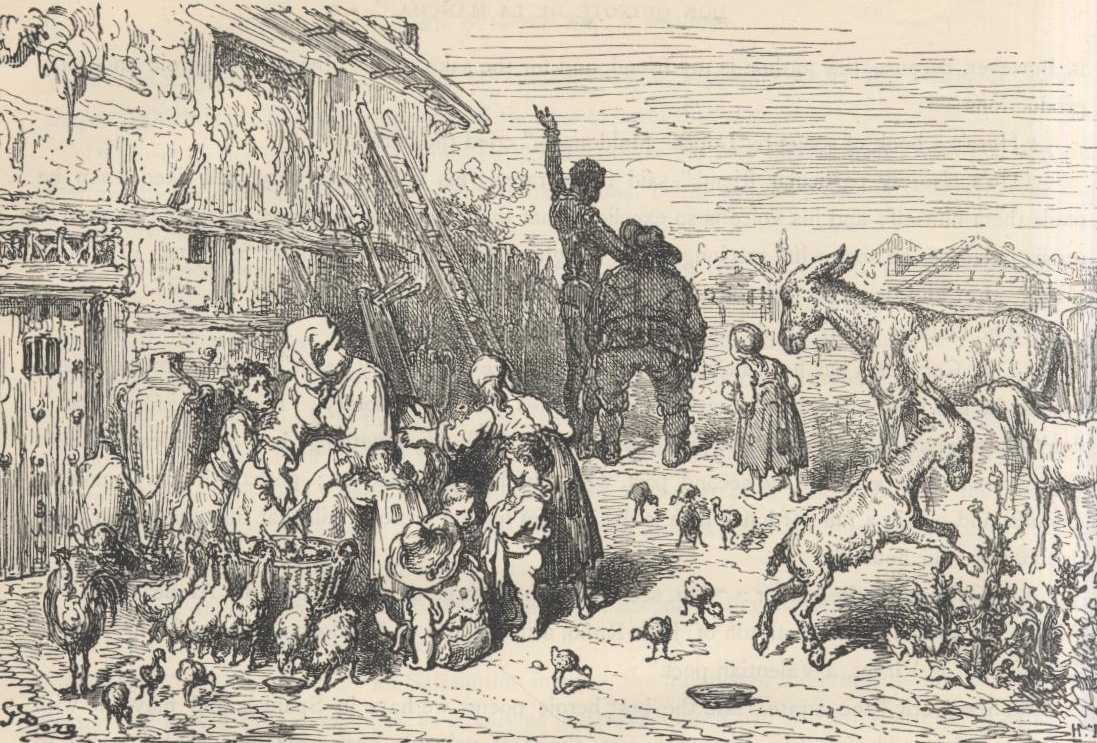 "D. Quixote convence Sancho Pança" (1863), iIustração por Gustave Doré para “Don Quixote“ de Miguel de Cervantes.